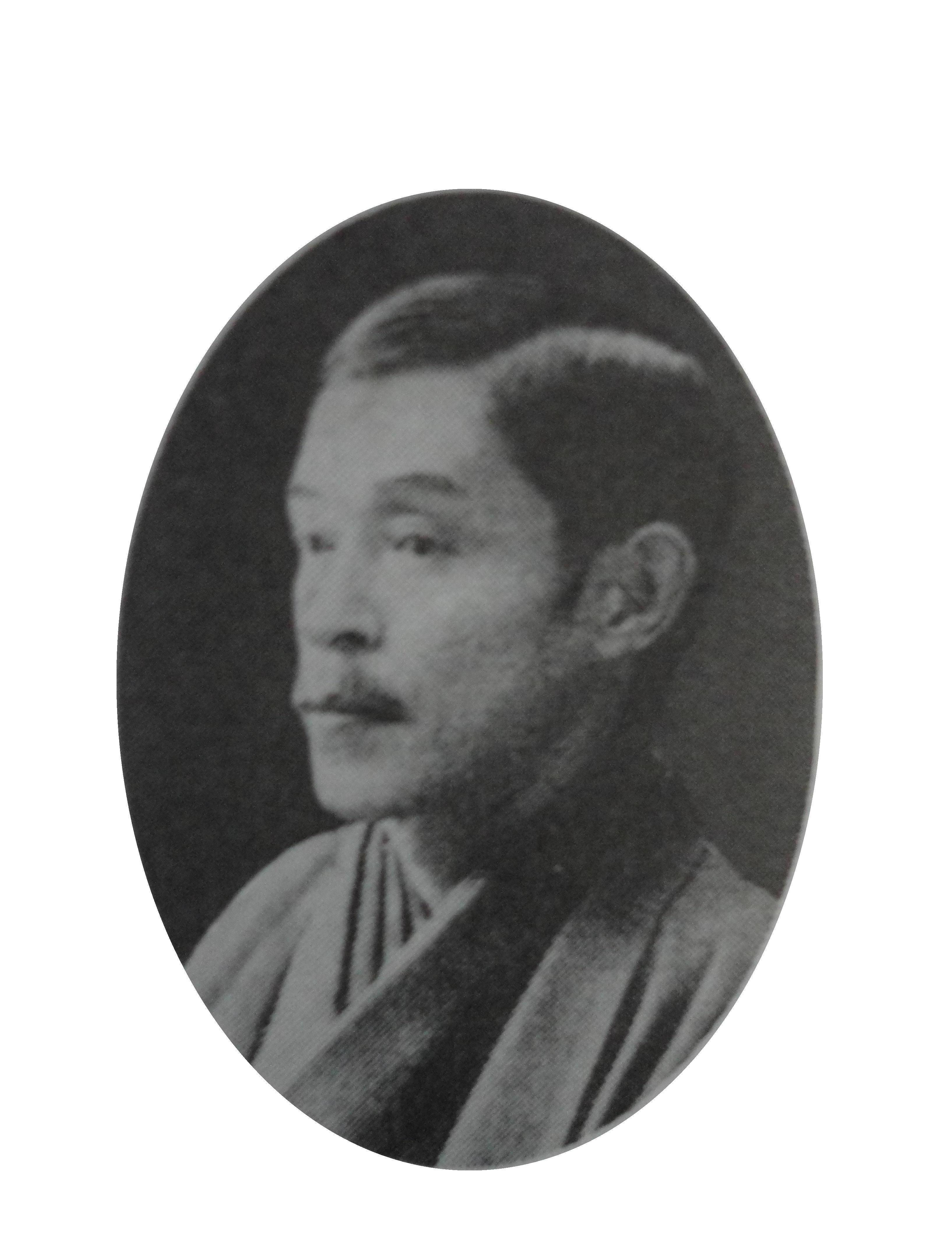 寺崎広業写真